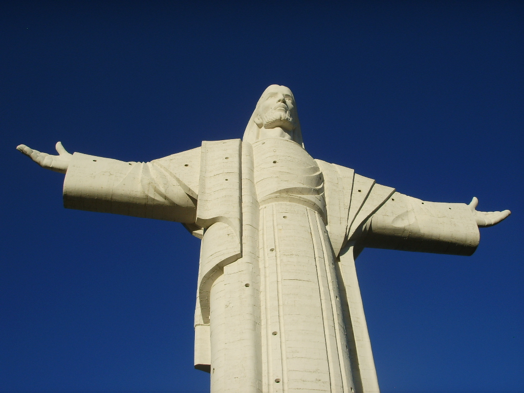 Cristo de la Concordia en la ciudad de Cochabamba, Bolivia.